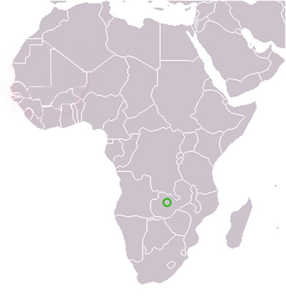 Localización del Reino Mutondo